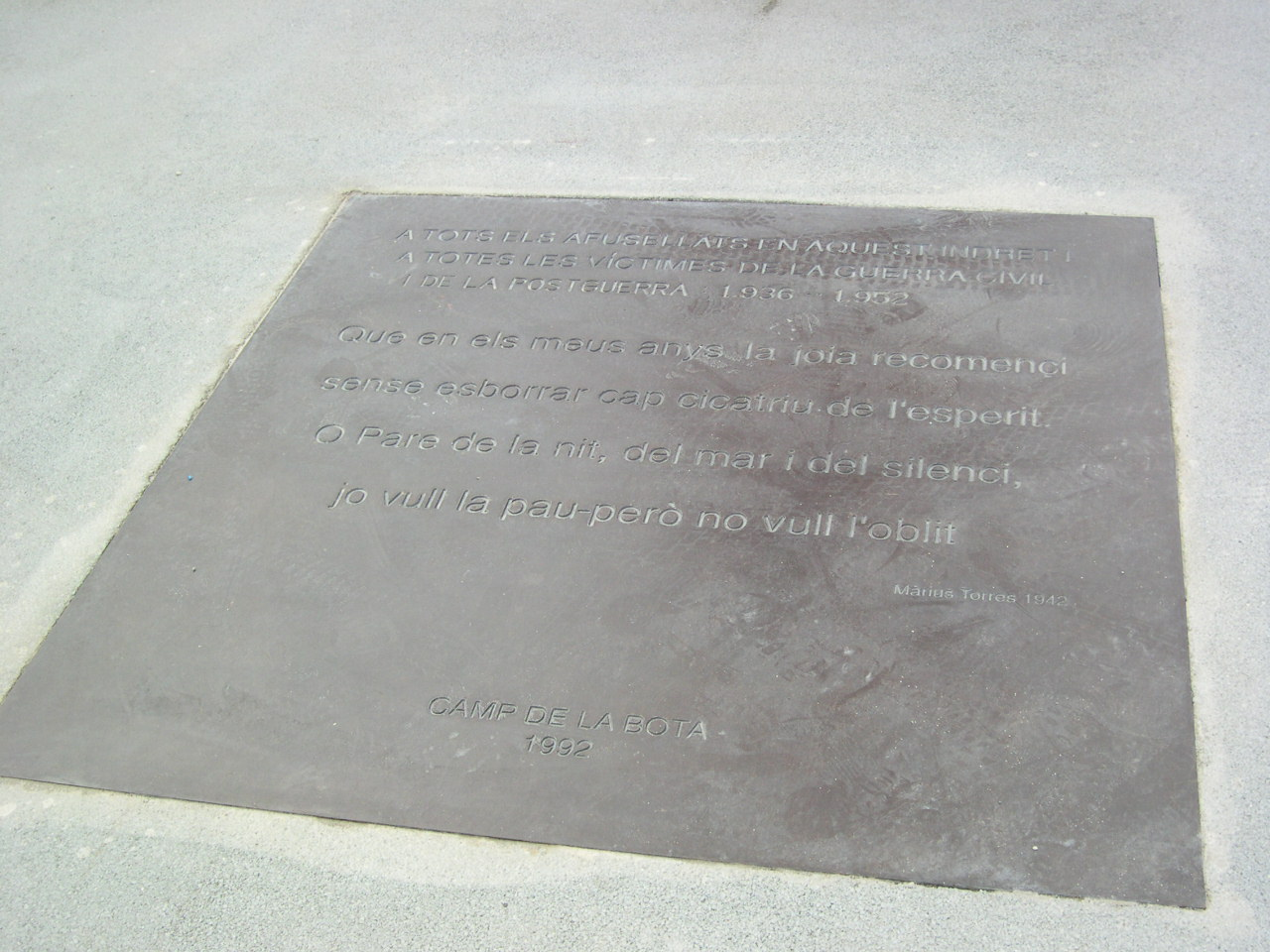 Placa commemorativa de tots els afusellats en la guerra civil i la postguerra pel règim de Franco al Camp de al Bota